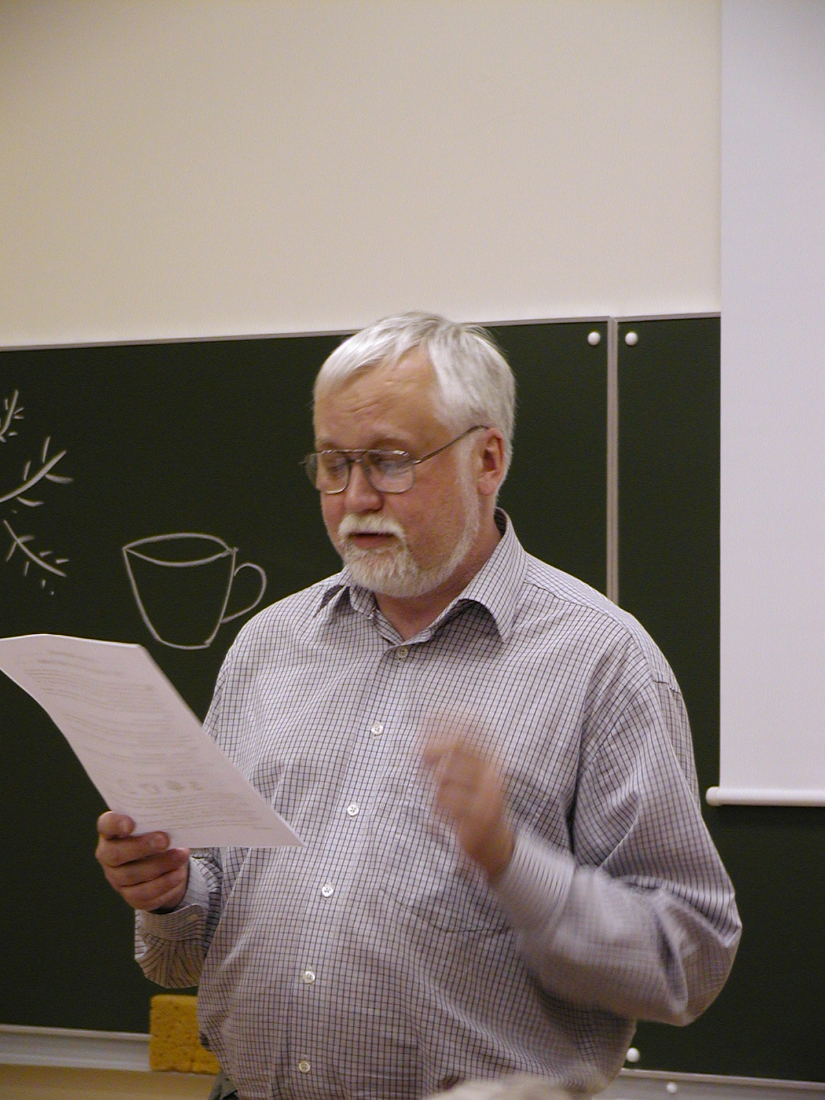 Fotis Yves Nevelsteen dum Baltiaj Esperanto-Tagoj en Litovio, julio 2007. S-ro Korĵenkov buŝe konsentis ke lia foto aperu en Vikipedio.